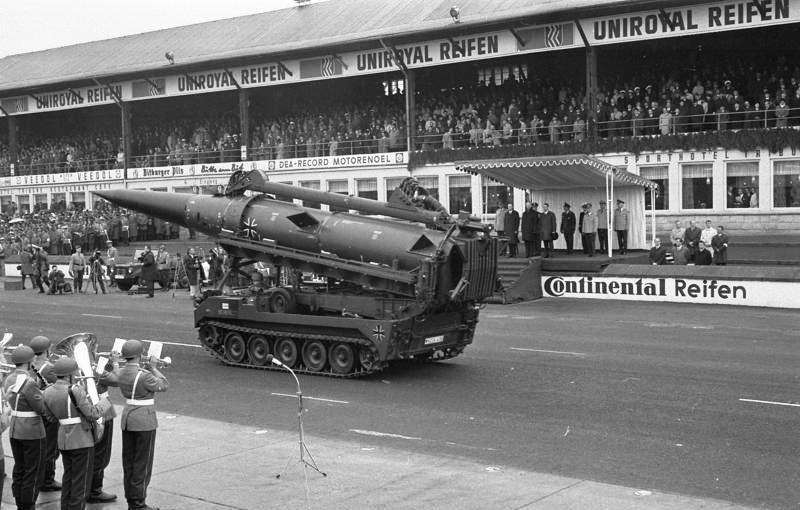 20 Jahre NATO. Bundeswehrparade auf dem Nürburgring.